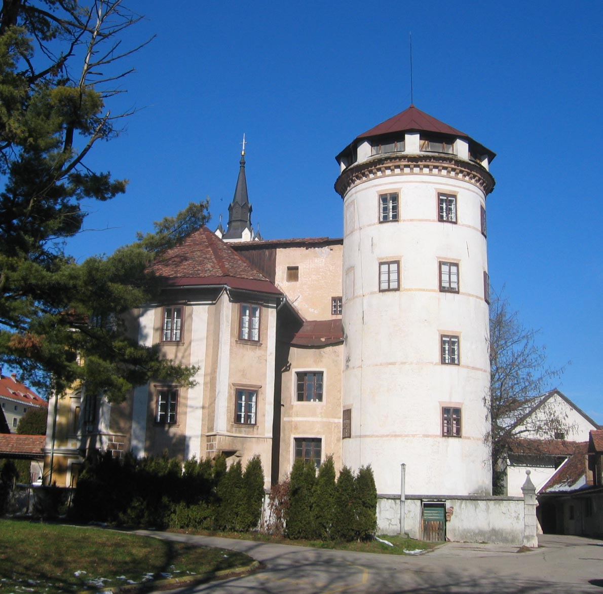 Stara Loka castle, in Škofja Loka, Slovenia photo:Ziga 20:43, 5 February 2007 (UTC)